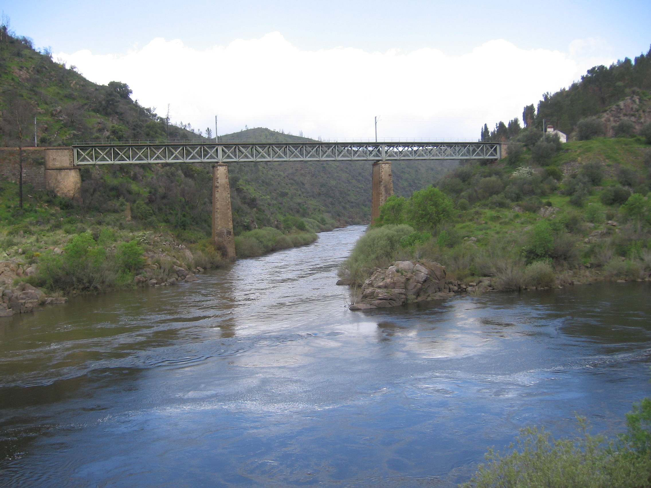 Ponte do Ocreza, linha da Beira Baixa